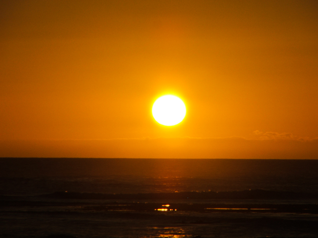 O Sol na Praia da Amaralina, Salvador, Bahia, Brasil.